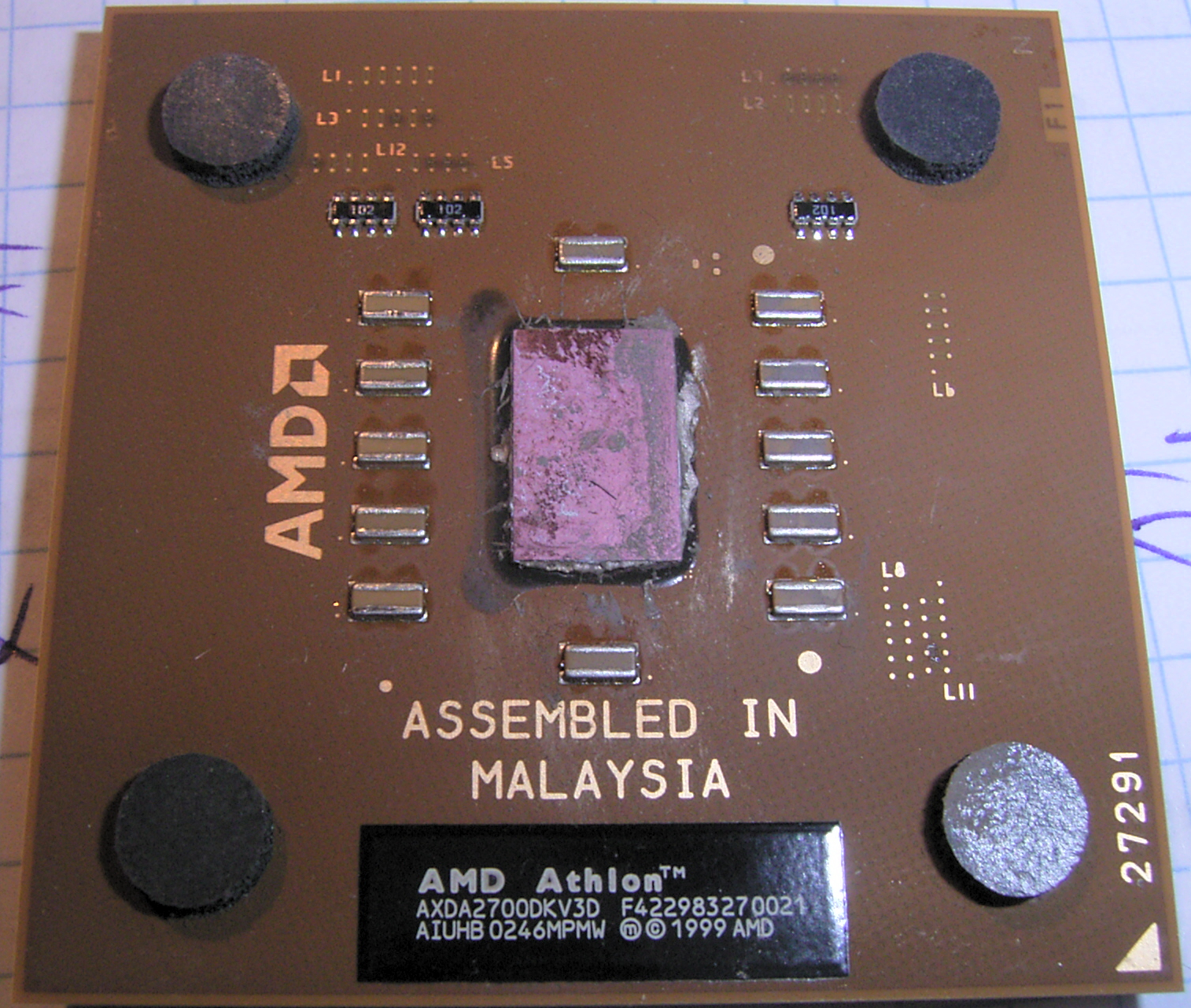 Athlon XP 2700+ (Thouroughbred B, Version mit braunem PCB, Stepping AIUHB, auf dem Kern sind Reste von Wärmeleitpaste vorhanden)